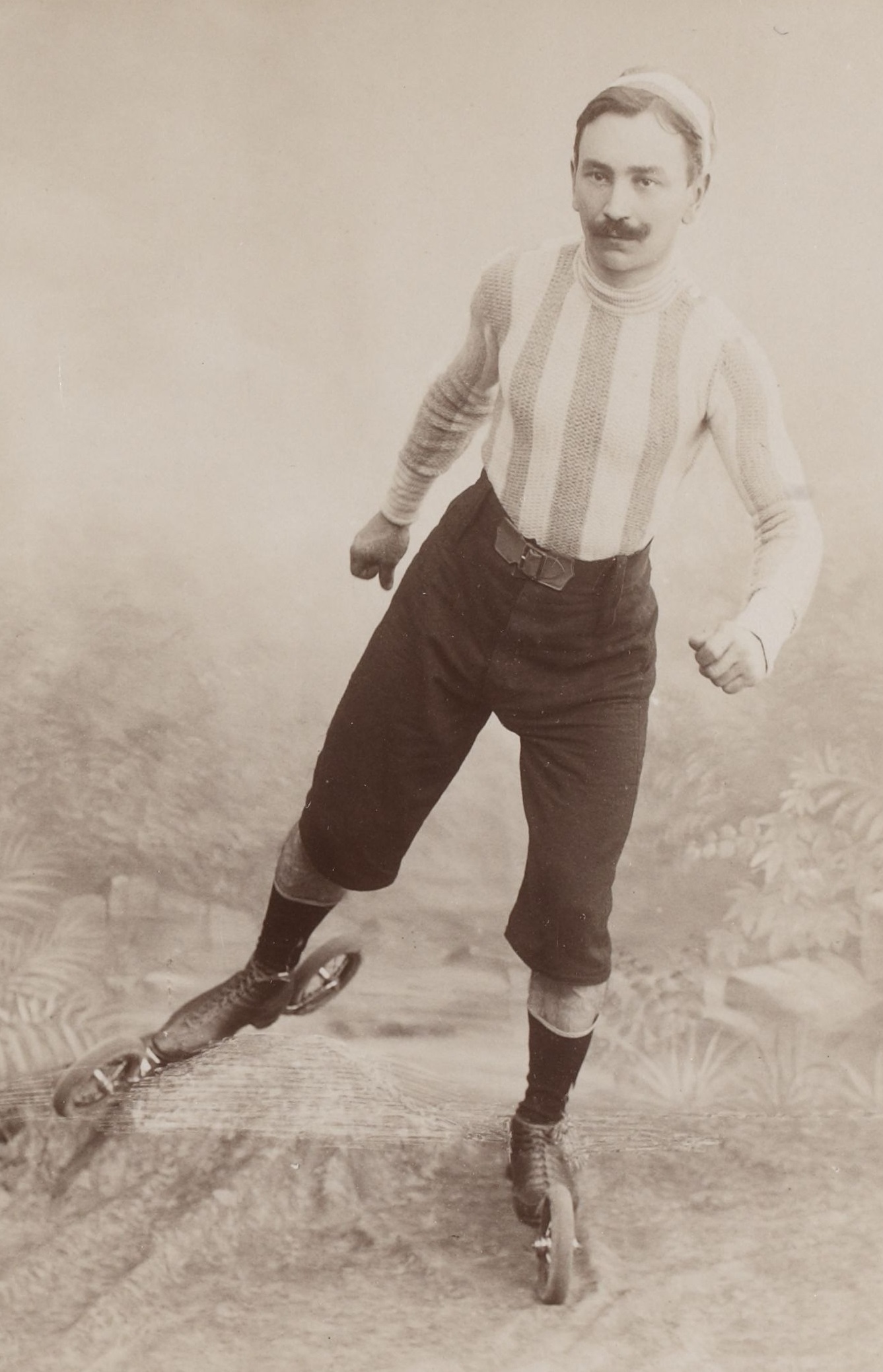 [Collection Jules Beau. Photographie sportive] : T. 7. Année 1898 / Jules Beau : F. 6v. Weismann, gagnant du tir du Lendit, Auteuil ; Paul Granclaude